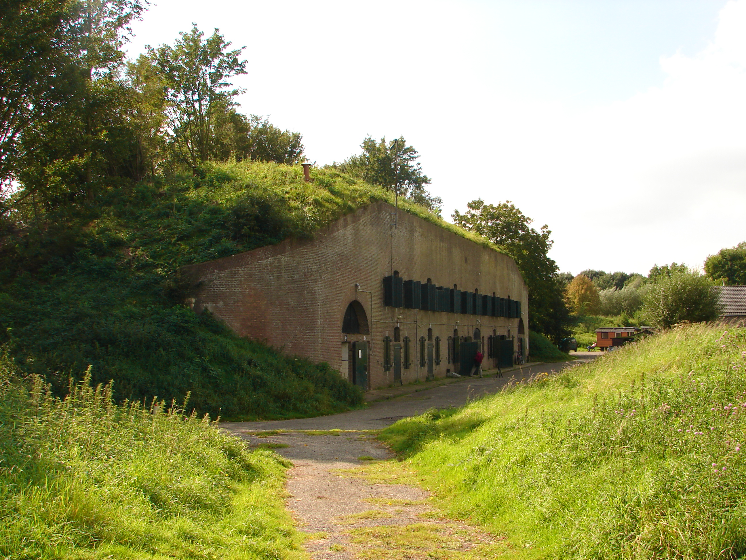 Fort Het Hemeltje